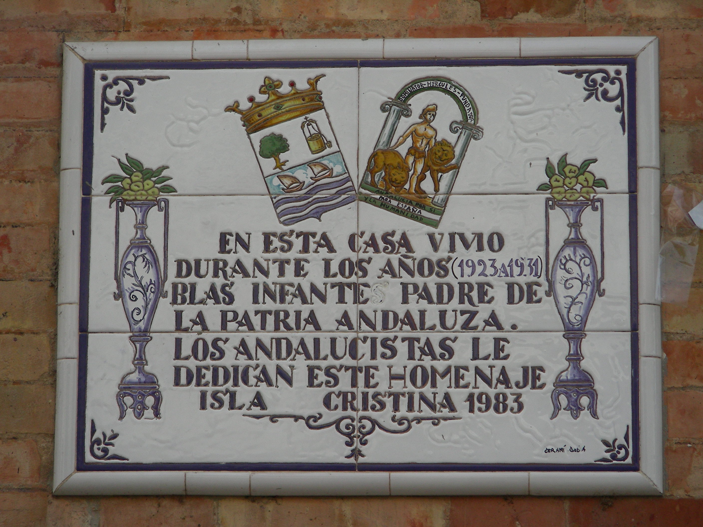 placa en la casa de Blas Infante en Isla Cristina